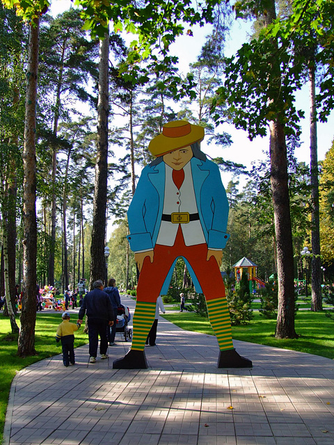 Детский парк "Сказочный"